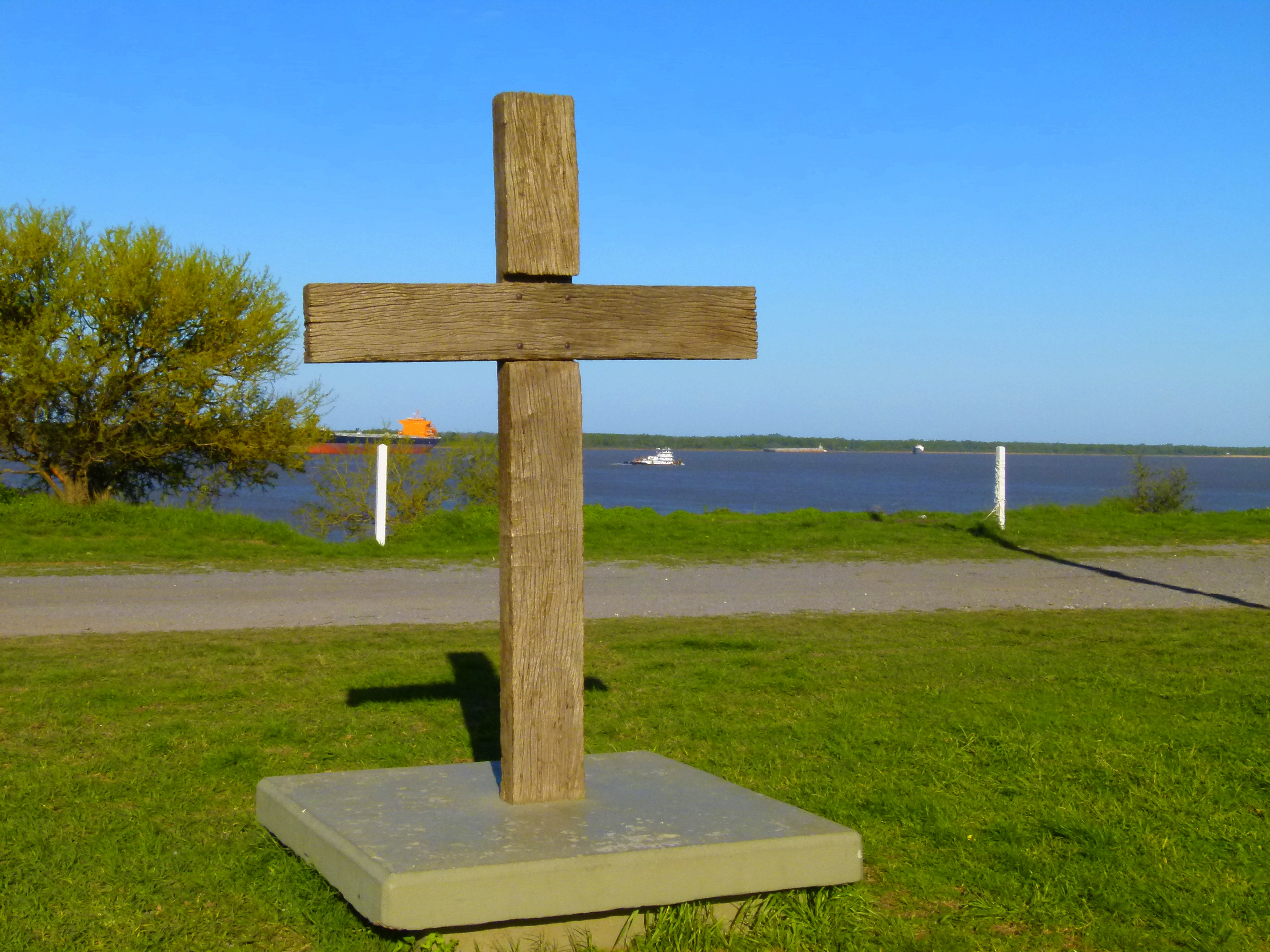 Predio de 15 ha donde se recuerda la batalla (Ver Wikipedia). No hay monumento. Sólo una cruz de quebracho, colocada en 1939. La ley nacional fue promovida por el Dip. Nac. Lorenzo Domínguez, antes intendente de Puerto Gral. San Martín